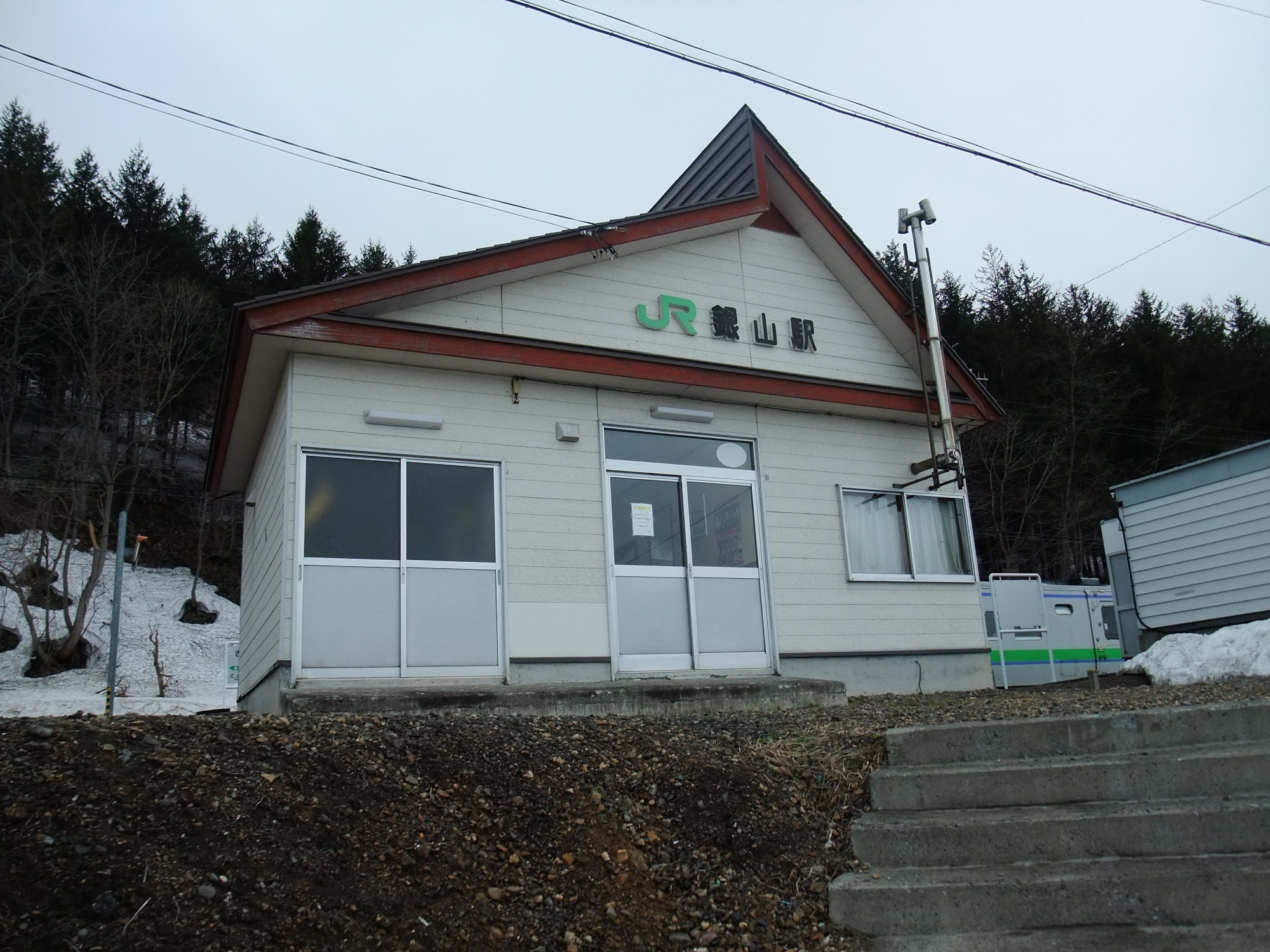 函館本線銀山駅